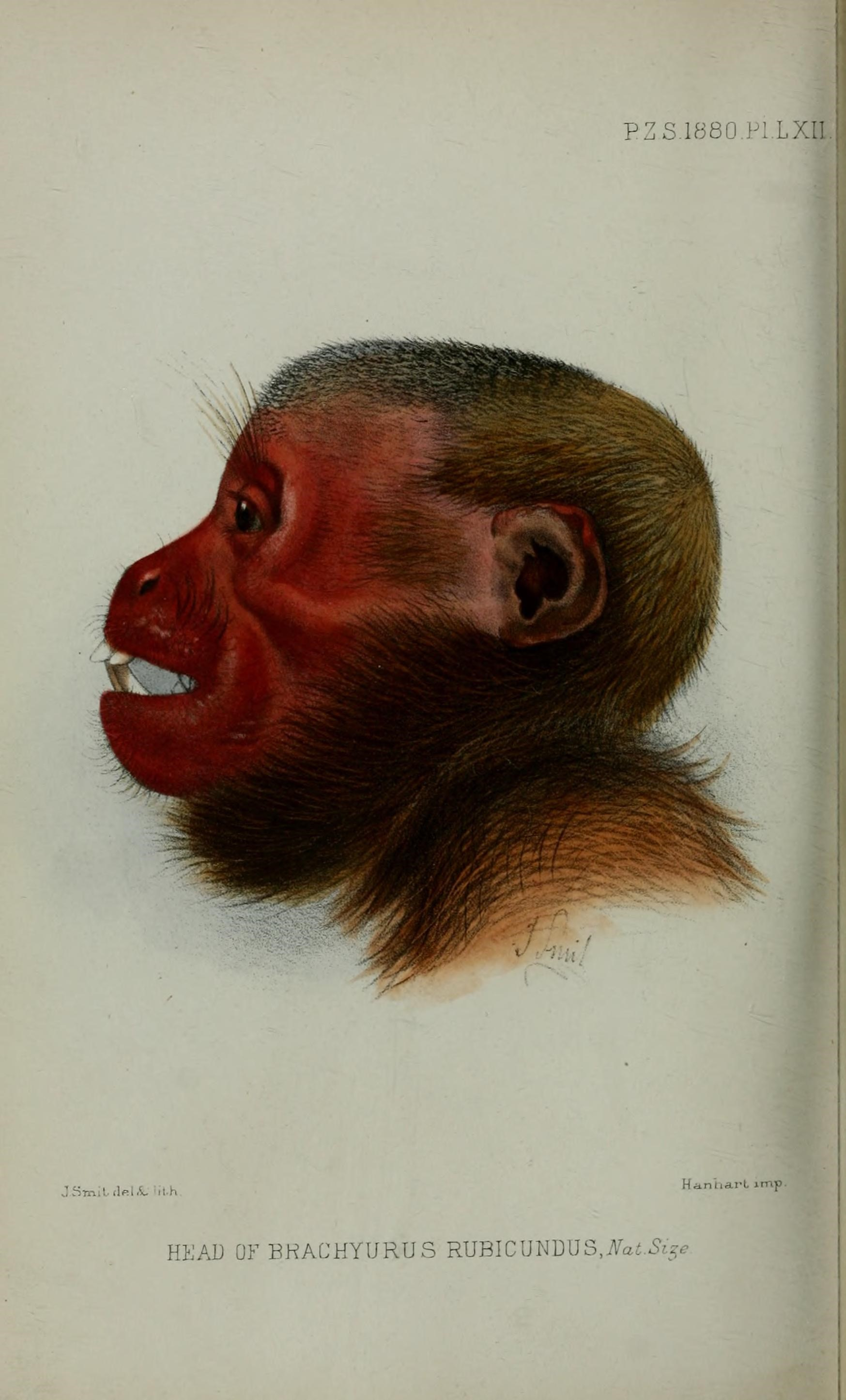 P.Z.S. 1880. Pl. LXII J. Smit del & lith. Hanhart imp. HEAD OF BRACHYURUS RUBICUNDUS.